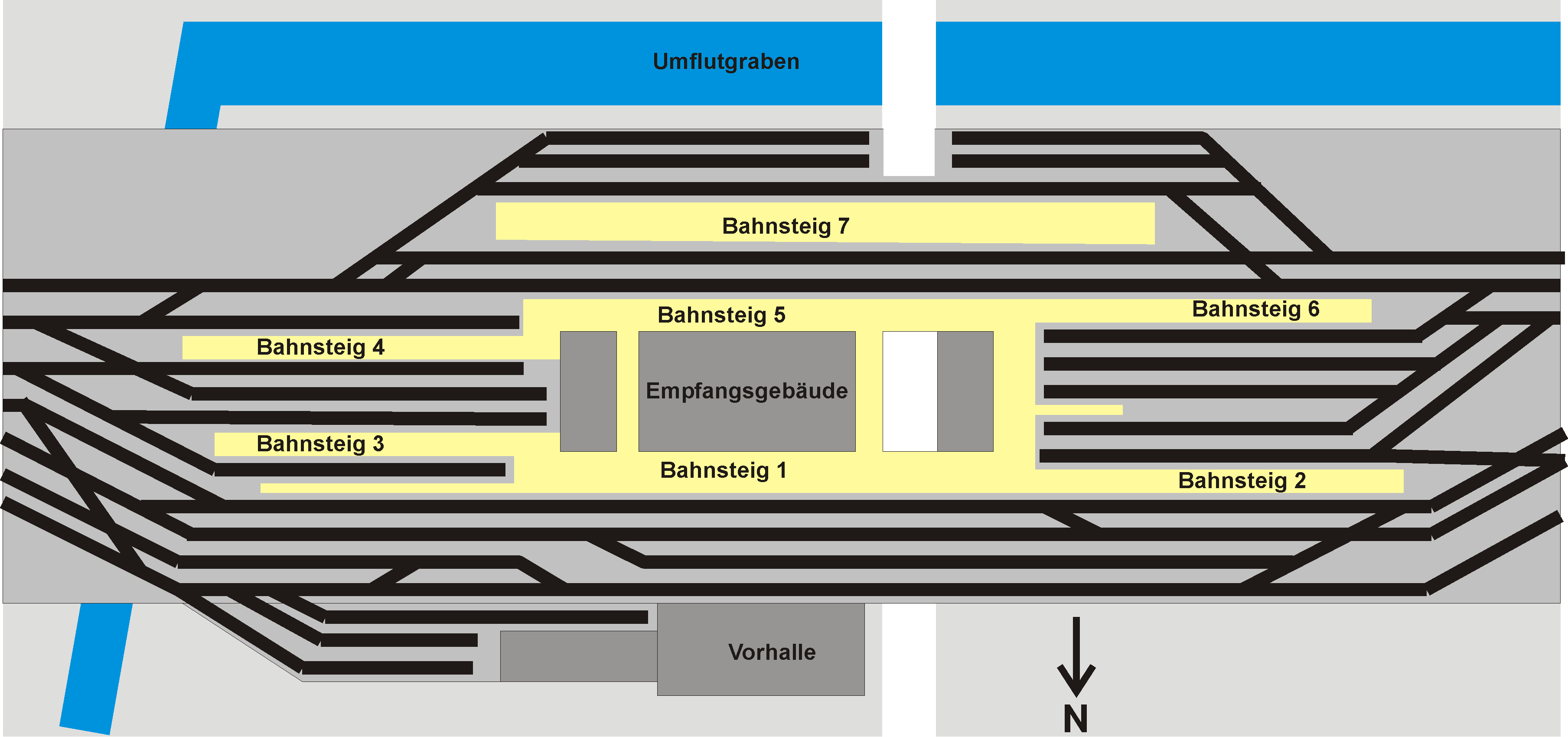 Gleisplanschema Hbf. Erfurt Diese Skizze zeigt schematisiert die Lage der Gleise im Hauptbahnhof Erfurt im Jahr 1957.